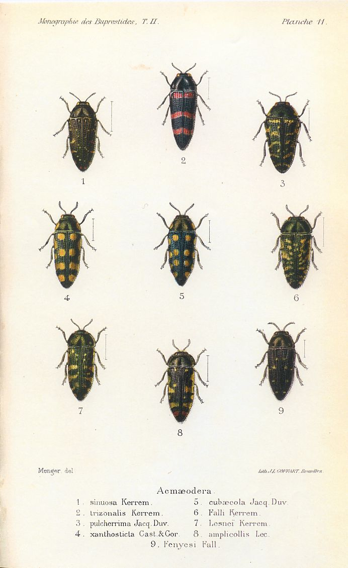 Acmæodera sinuosa Kerrem. = Acmaeodera sinuosa Kerremans, 1906 Acmæodera trizonalis Kerrem. = Acmaeodera trizonalis Kerremans, 1892 Acmæodera pulcherrima Jacq. Duv. = Acmaeodera pulcherrima Jacquelin du Val, 1857 Acmæodera xanthosticta Cast. & Gor. = Acmaeodera xanthosticta Laporte & Gory, 1835 Acmæodera cubæcola Jacq. Duv. = Acmaeodera cubaecola Jacquelin du Val, 1857 Acmæodera Falli Kerrem. = Acmaeodera flavopicta Waterhouse, 1889 Acmæodera Lesnei Kerrem. = Acmaeodera lesnei Kerremans, 1906 Acmæodera amplicollis Lec. = Acmaeodera amplicollis LeConte, 1866 Acmæodera Fenyesi Fall. = Acmaeodera fenyesi Fall, 1899